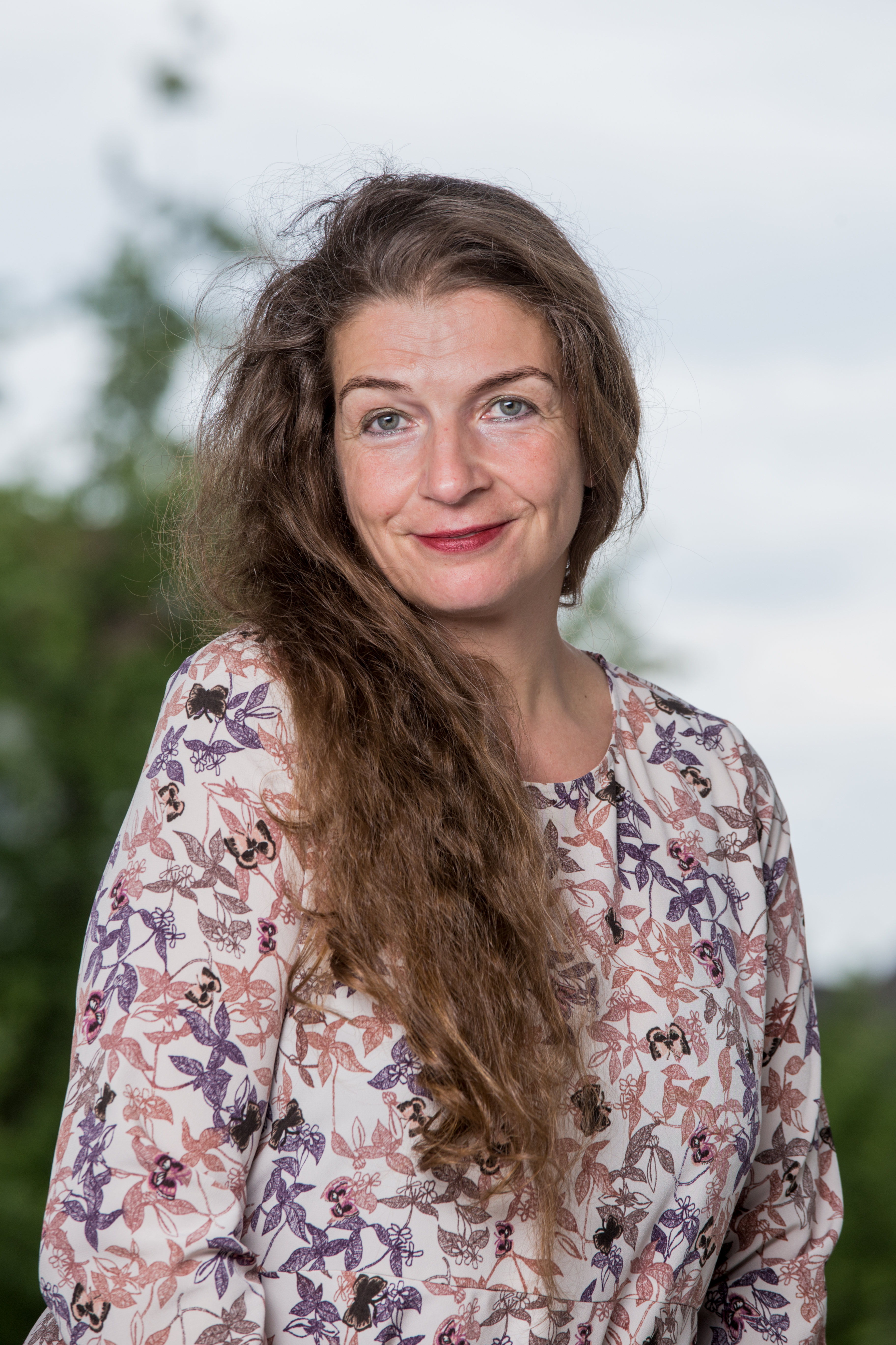 Christine Langer, deutsche Autorin